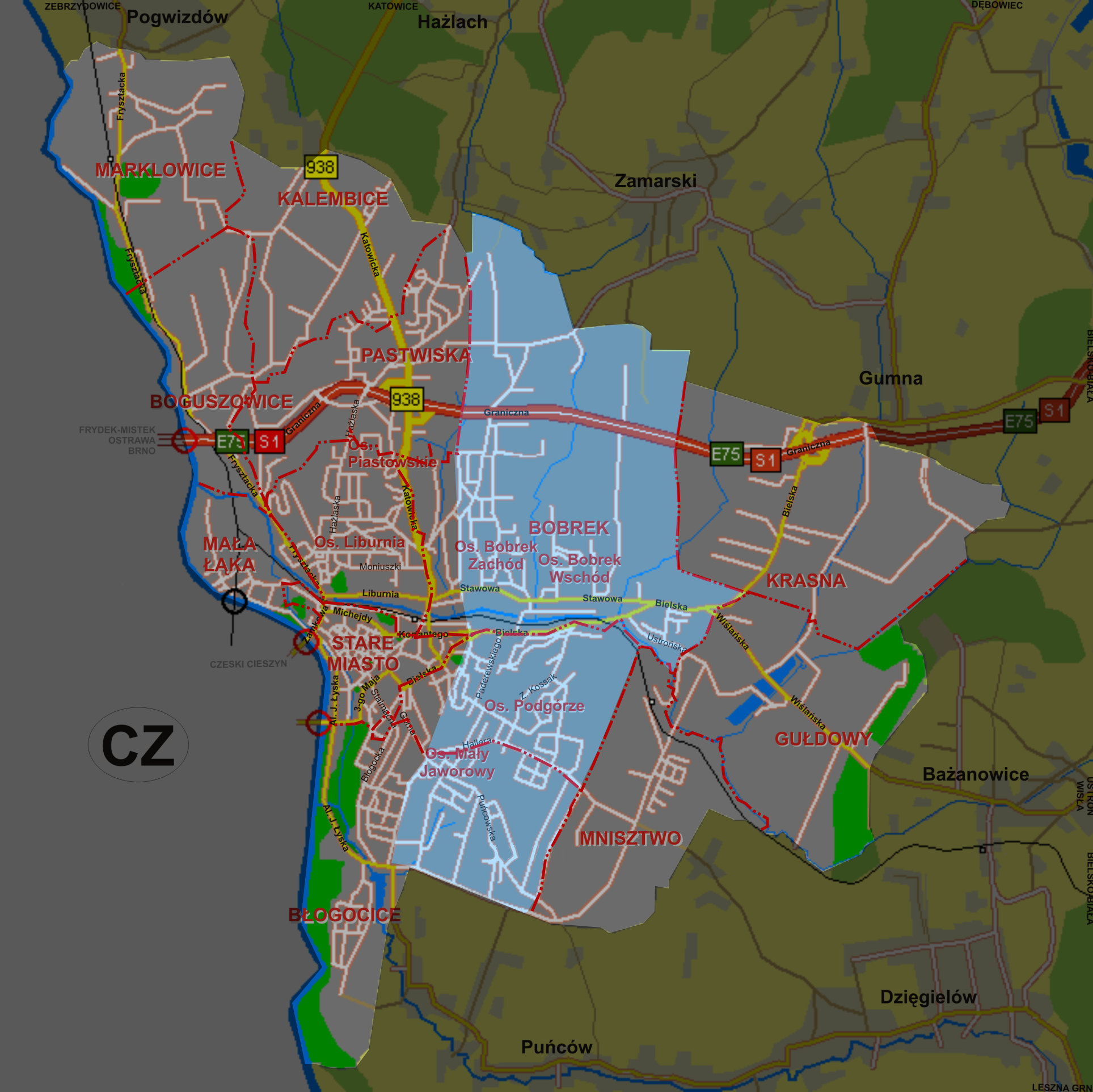 Plan ogólny miasta Cieszyna. Aktualizacja: III.2006